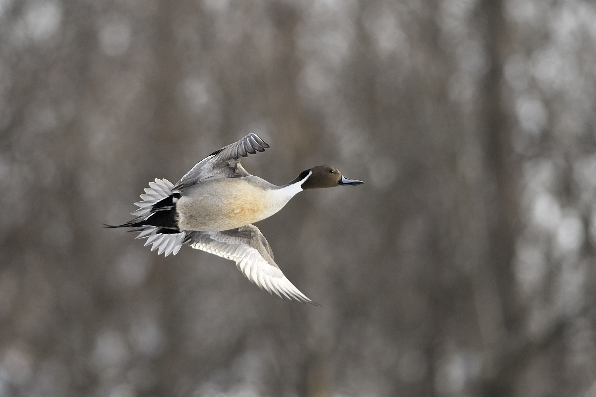 pintail